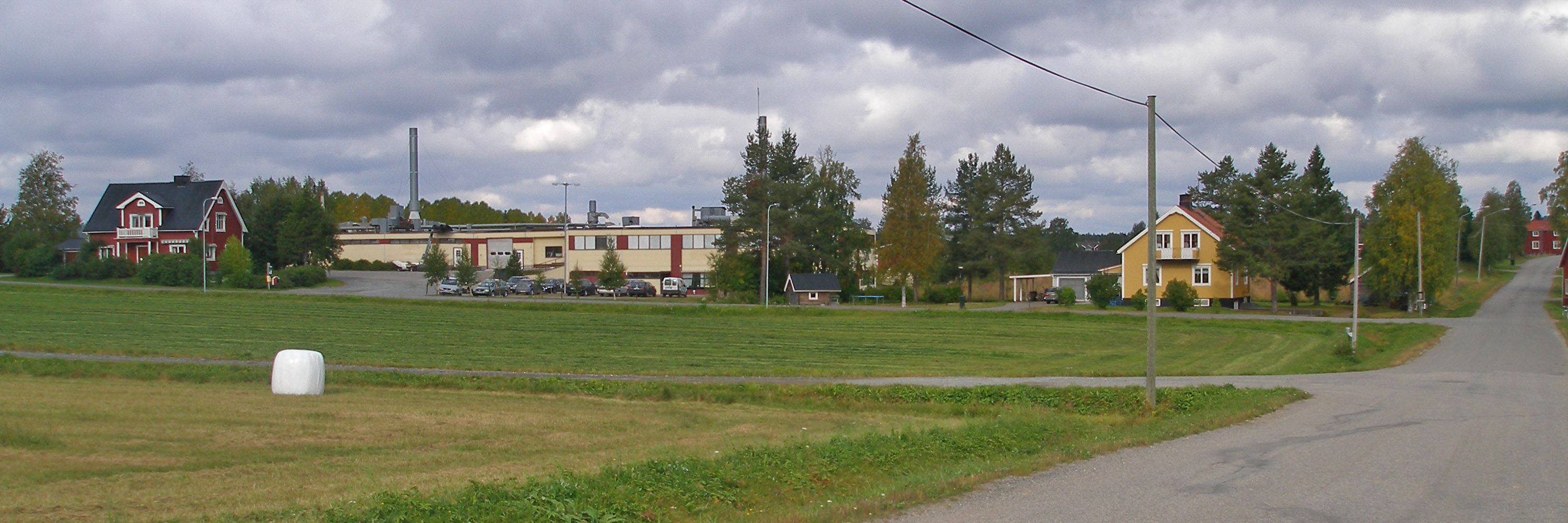 Byn Norrlångträsk i Skellefteå kommun. I lokalen till höger finns företaget Sandström Innovation AB. Före år 2000 fanns Utternbåtar AB i lokalen.